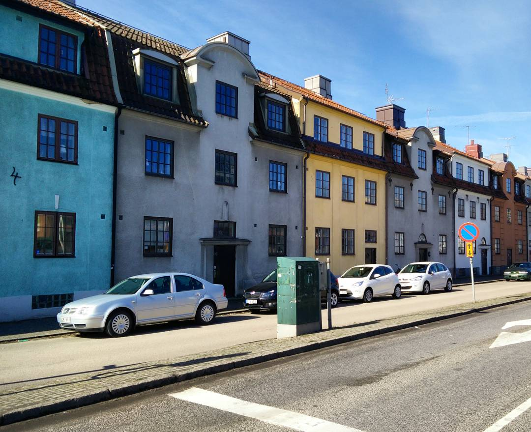 Färgglad huslänga på Laholmsvägen i Halmstad.